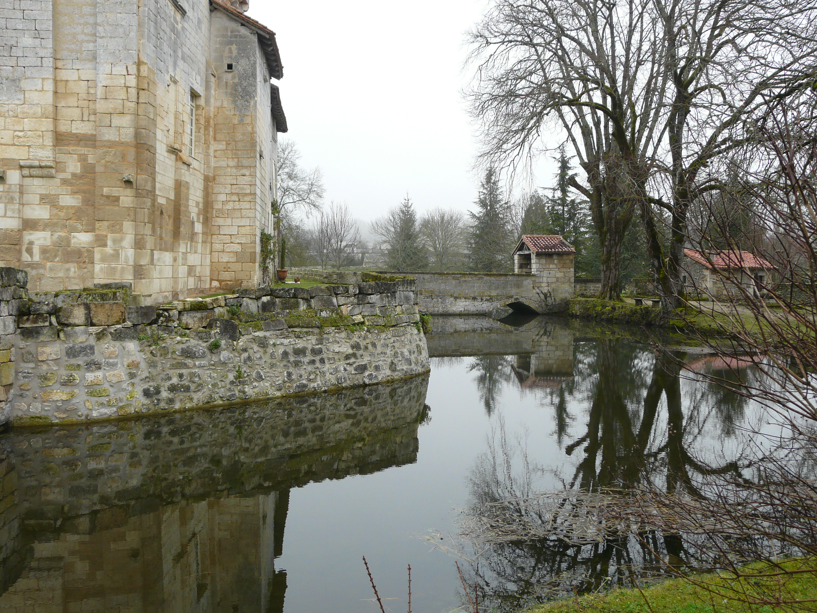 Les douves du château de Chapdeuil, Dordogne, France.